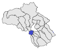 La Guingueta d'Ix a l'Alta Cerdanya, extreta d'un mapa de lliure disposició